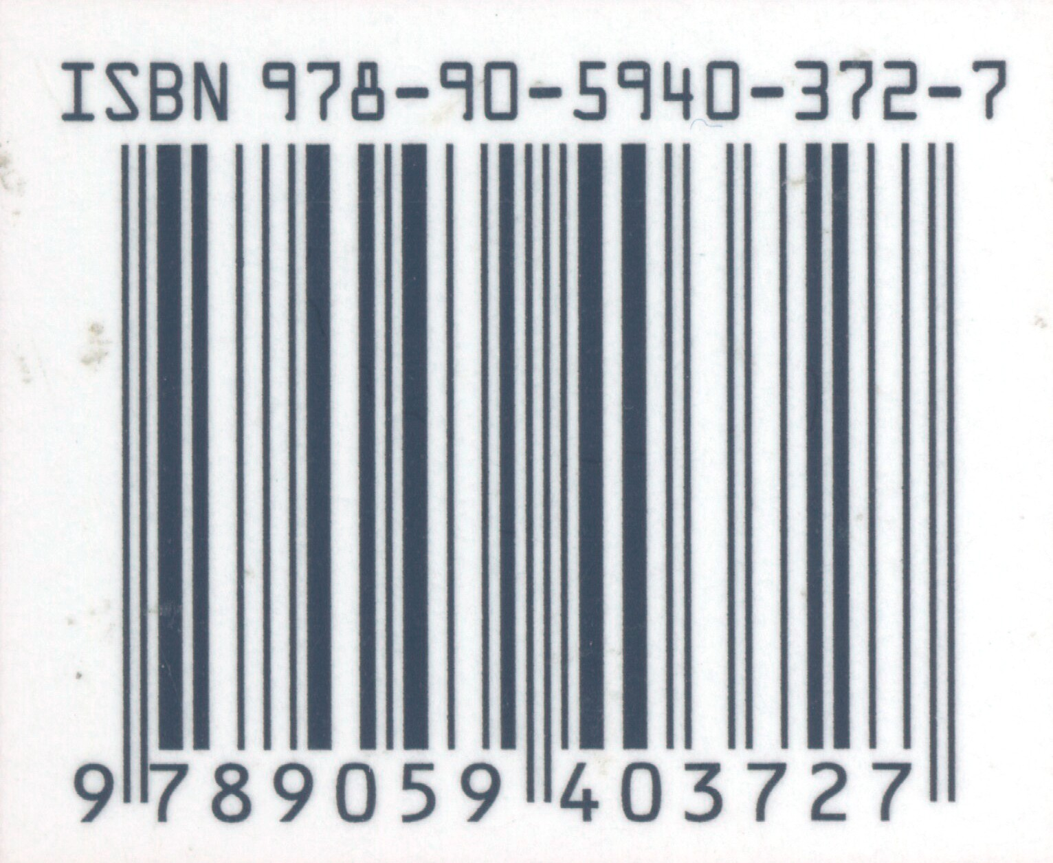 streeepjescode